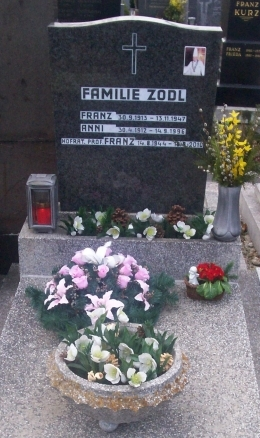 Franz Zodl Grabstätte